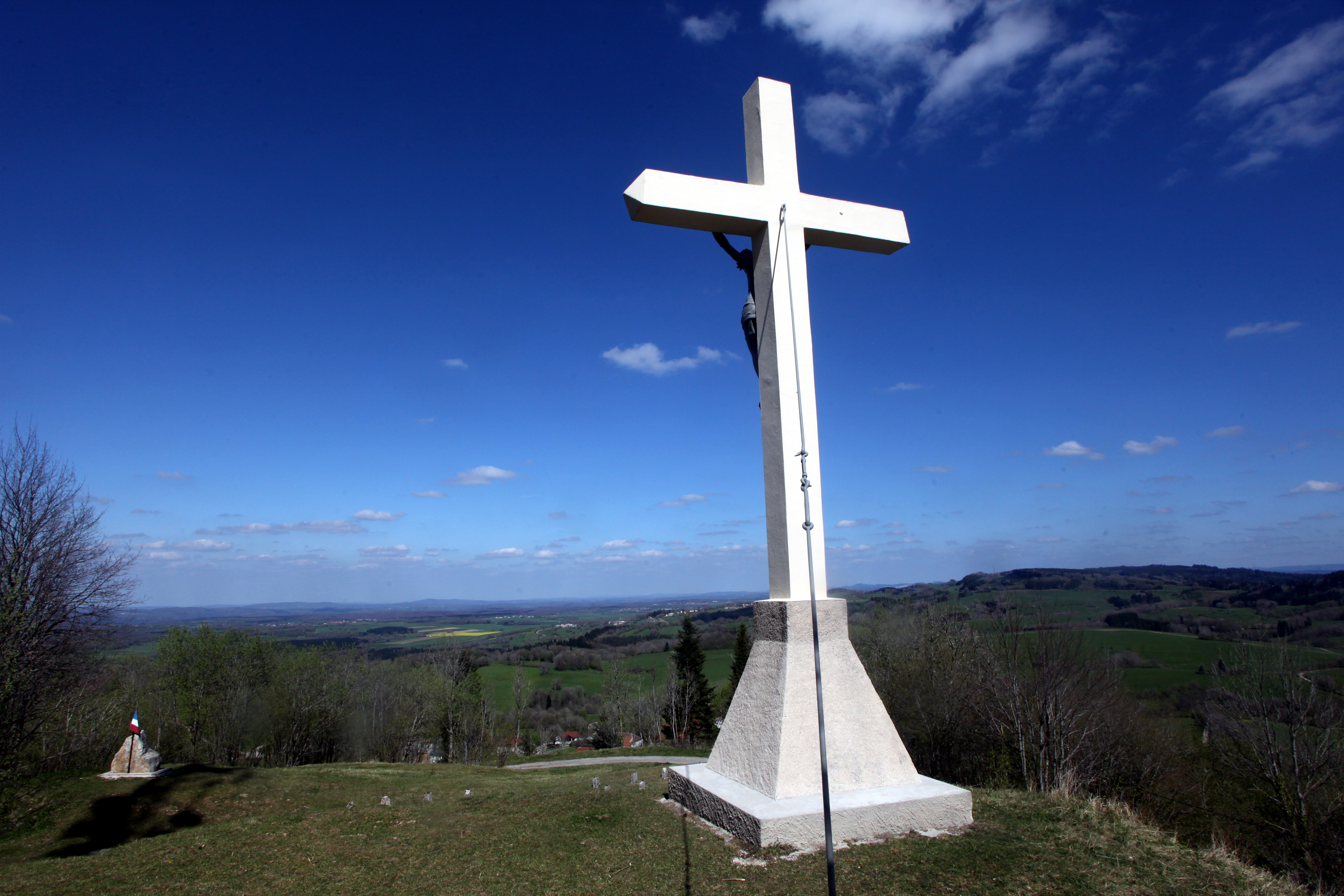 Croix sur la butte de Montmahoux (Doubs).